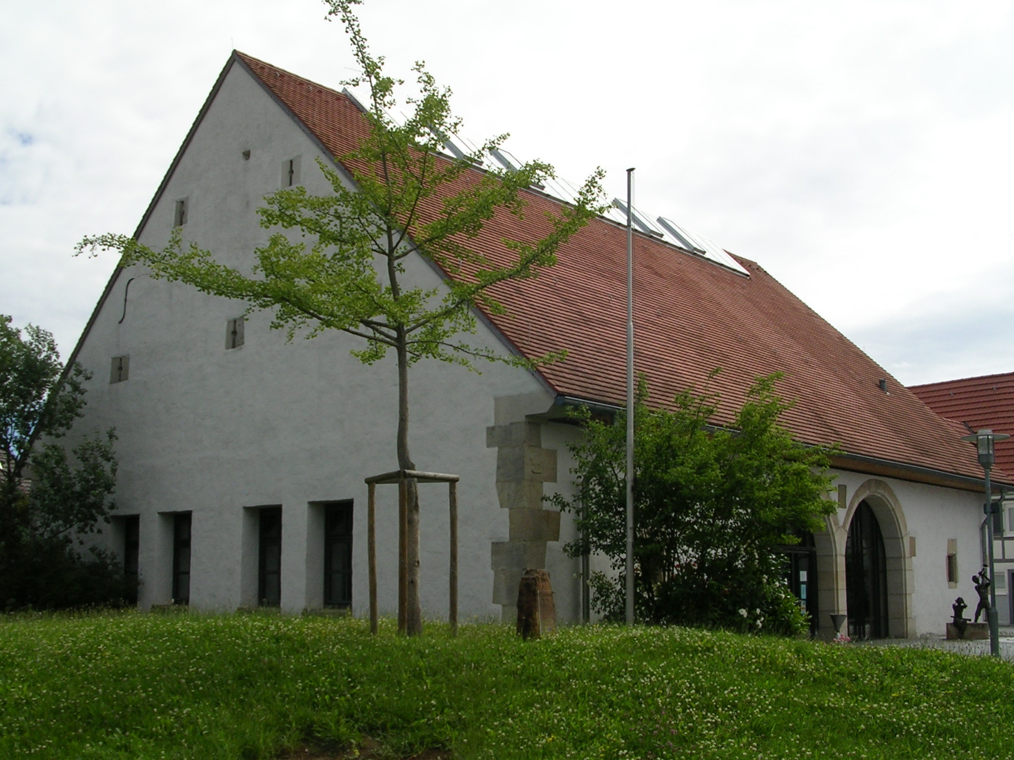 Zehntscheuer in Deizisau (tithe barn, Deiziau, Germany)